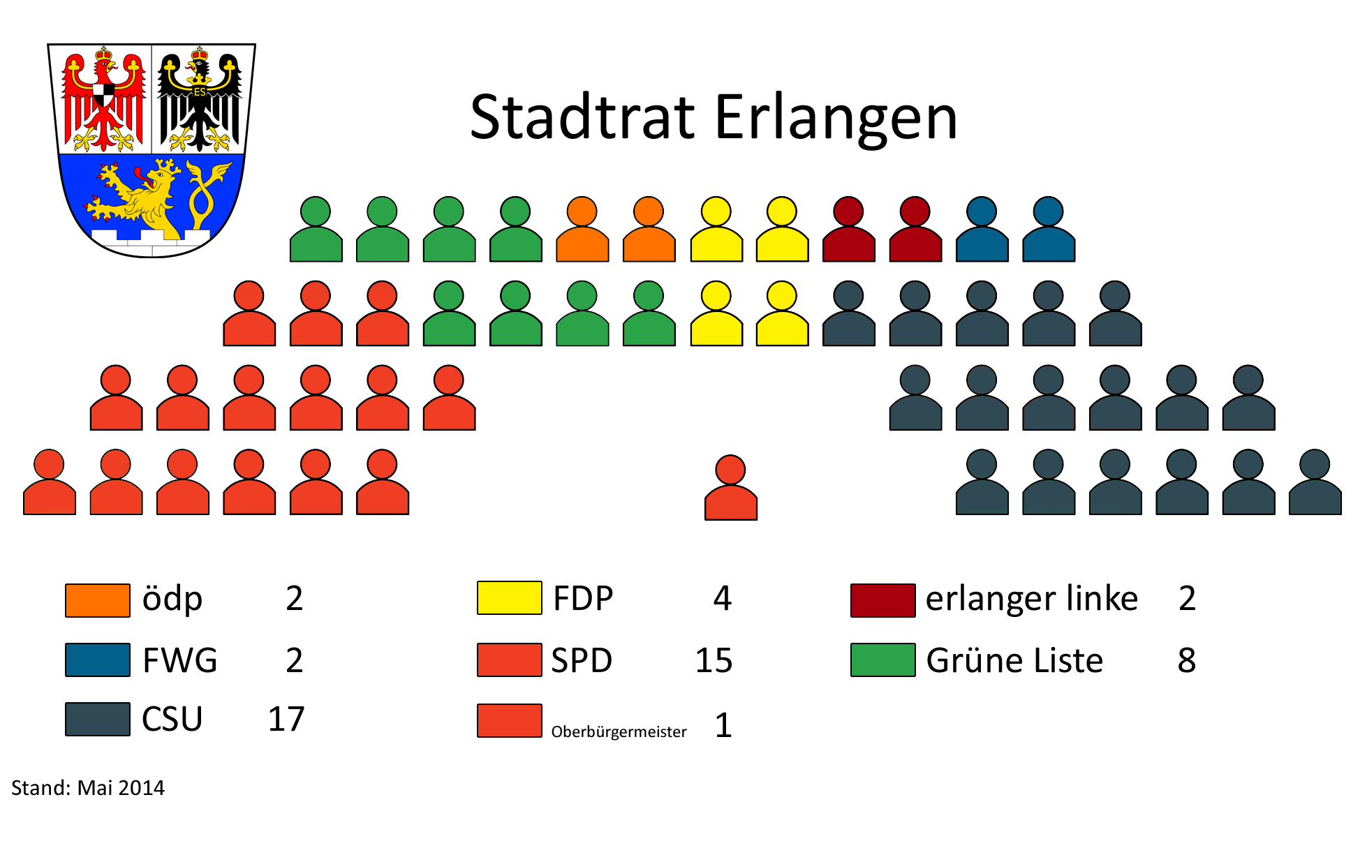 Zusammensetzung des Stadtrat der Stadt Erlangen